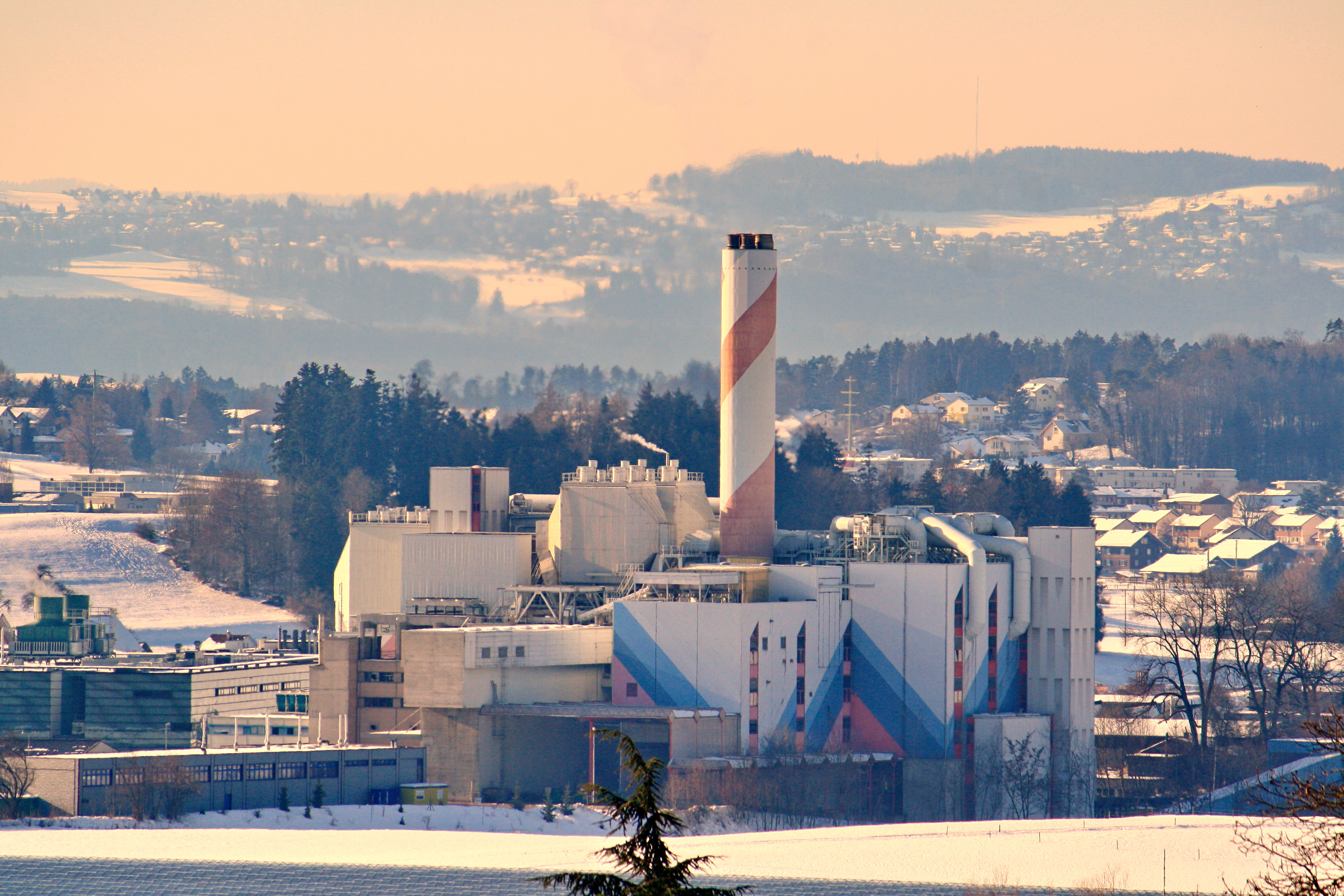 Kehrichtverbrennungsanlage Zürcher Oberland (KEZO) Hinwil (Switzerland), as seen from Ringwilerstrasse in Hinwil (Switzerland), Pfannenstiel (to the left) and Forch respectively Wetzikon in the background.